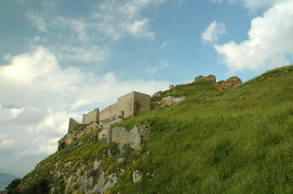 Vicari - Castello